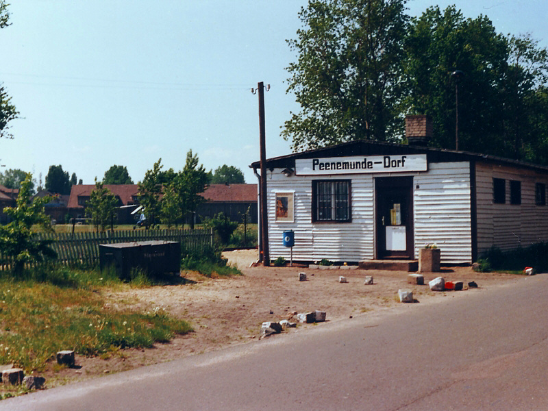 Bahnhof Peenemünde Dorf im Jahr 1993, heute durch einen modernen Standard-Haltepunkt der UBB ersetzt